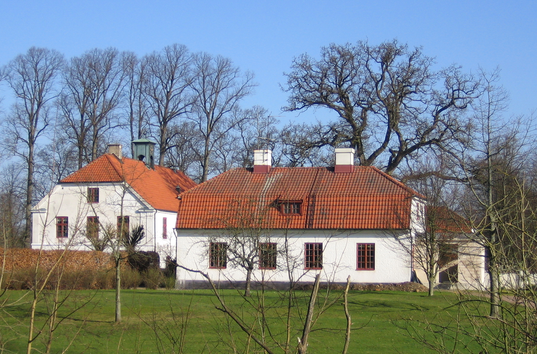 Sireköpinge manor in Skåne, Sweden